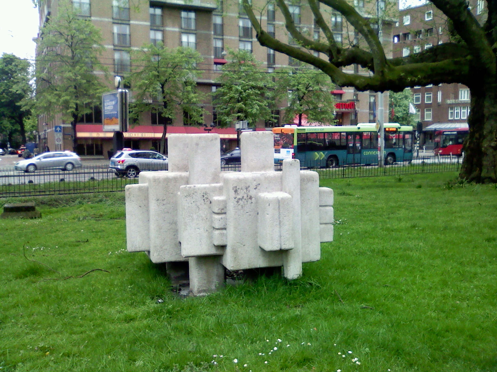 Horizontale compositie in het Leidsebosje, Amsterdam-West